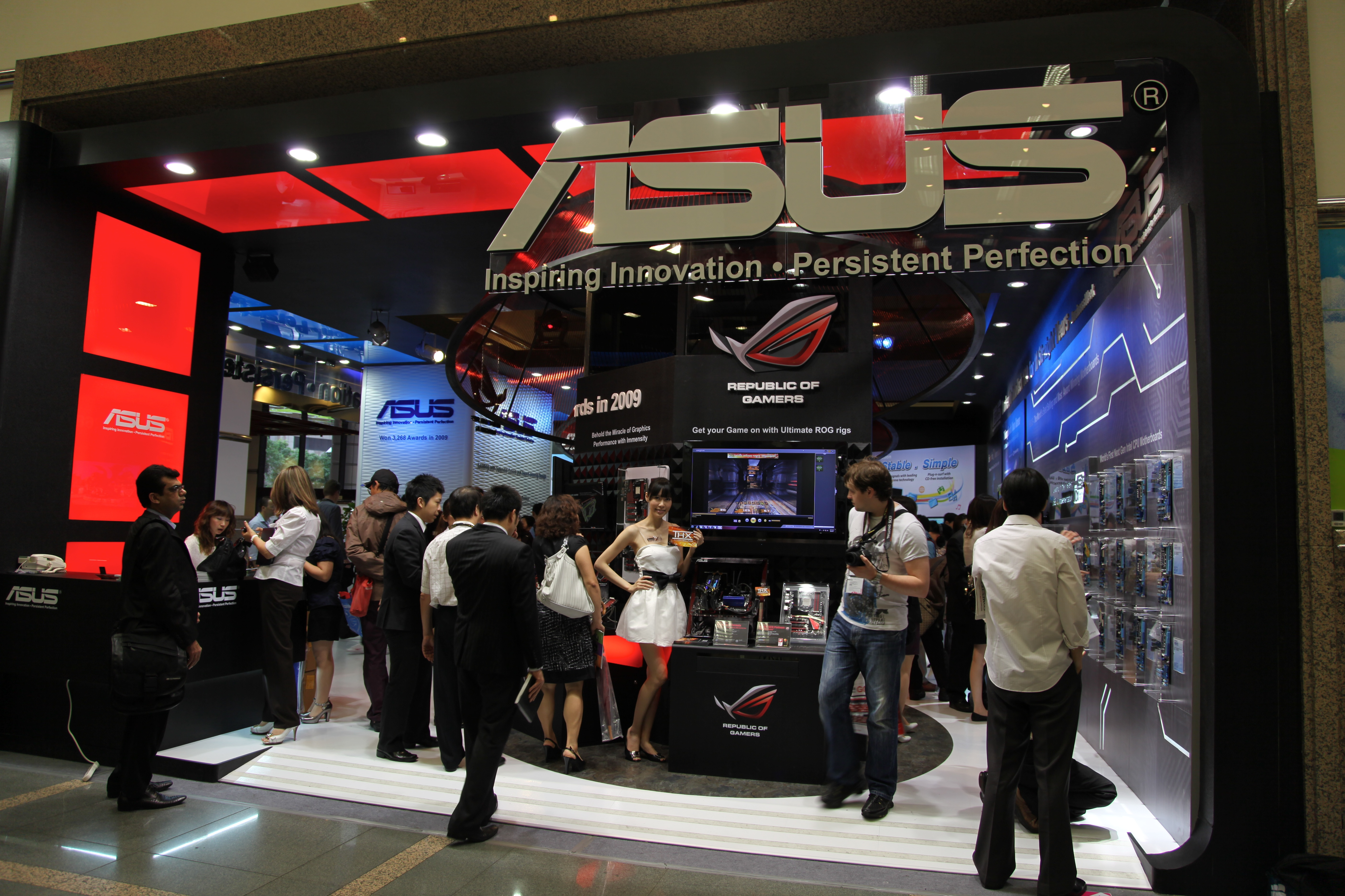 中文（台灣）: 2010台北國際電腦展，華碩電腦攤位。